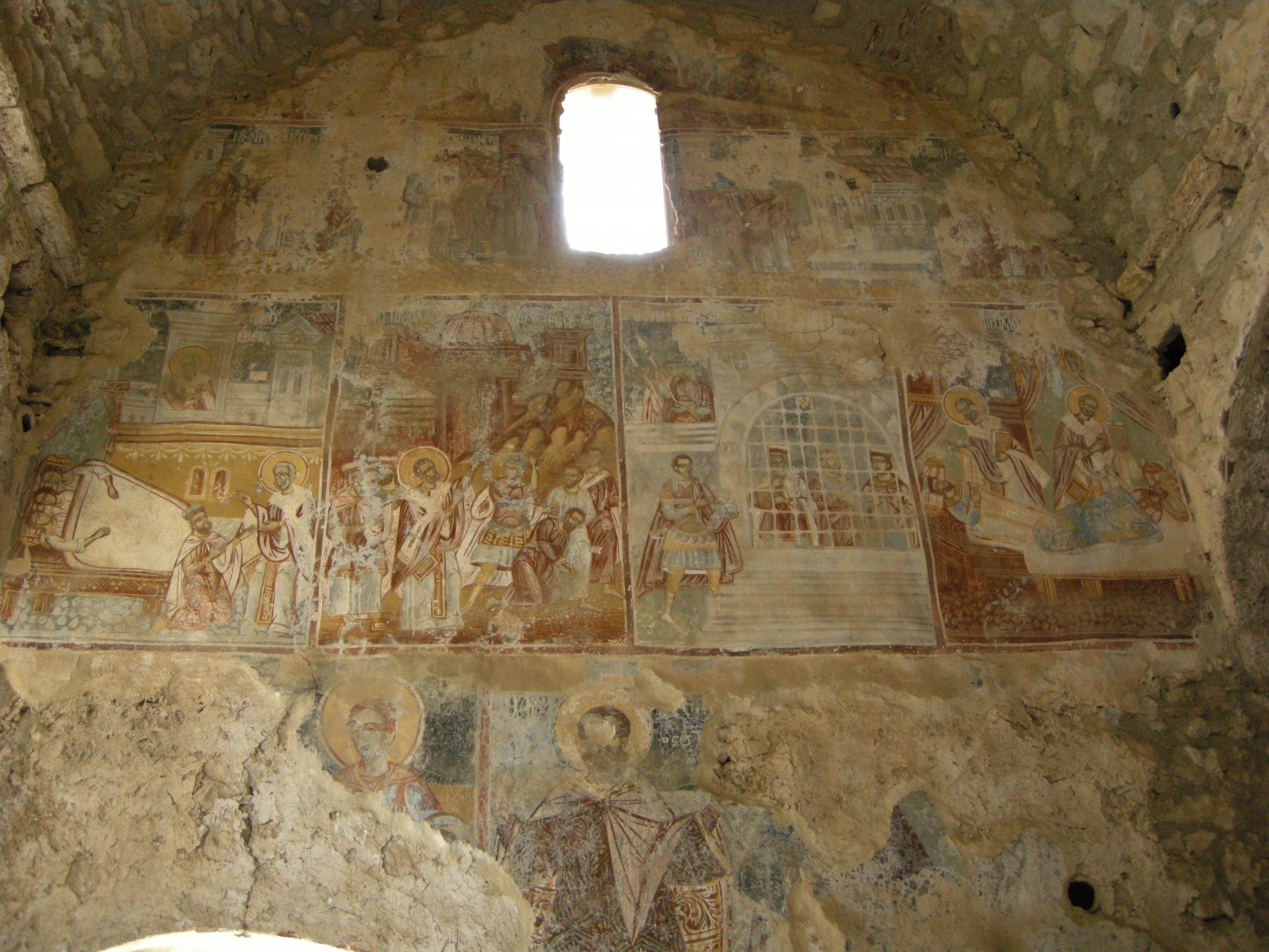 Agios Nikolaos, inside , frescos